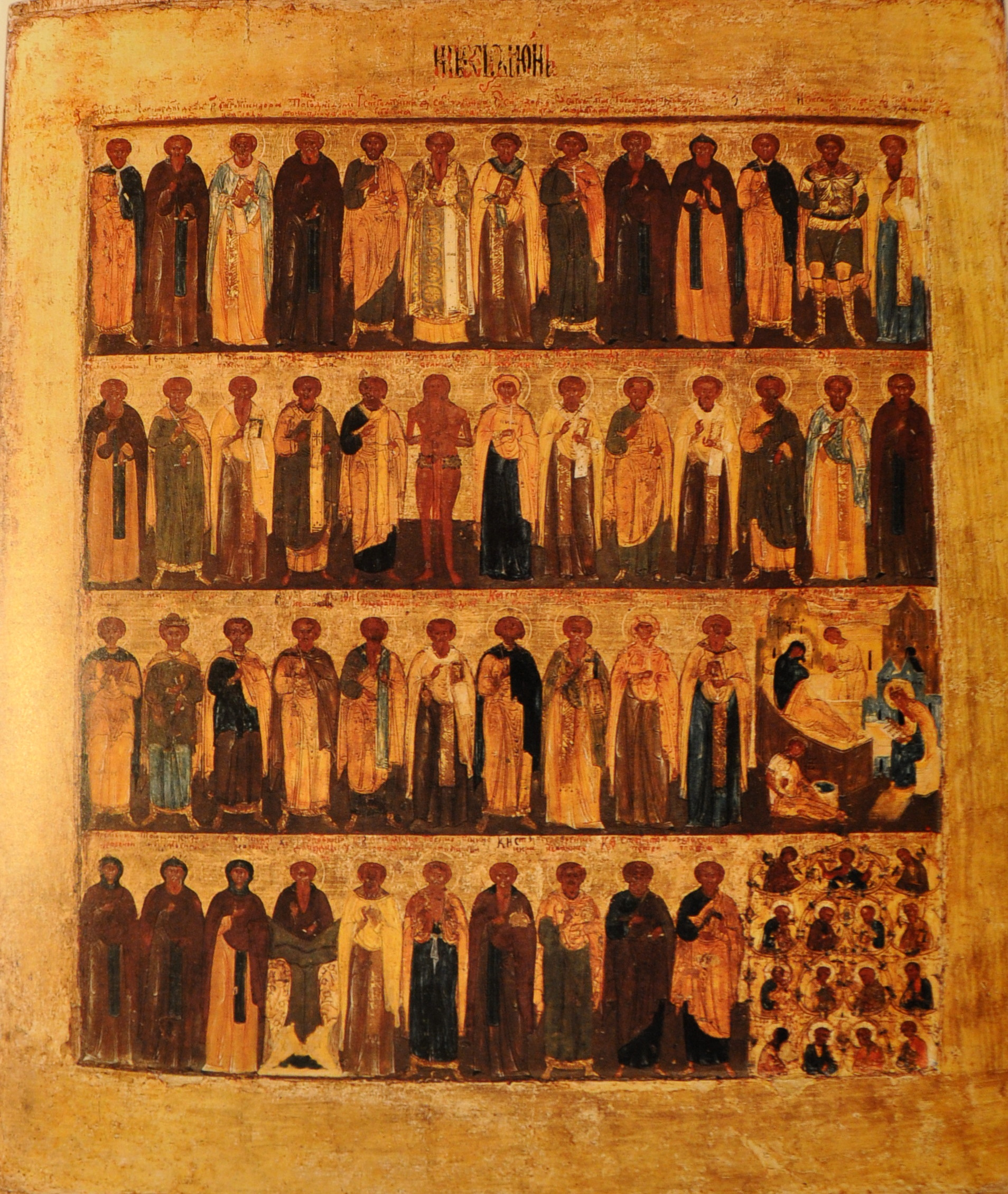 Икона из церкви Димитрия Прилуцкого на Наволоке в Вологде